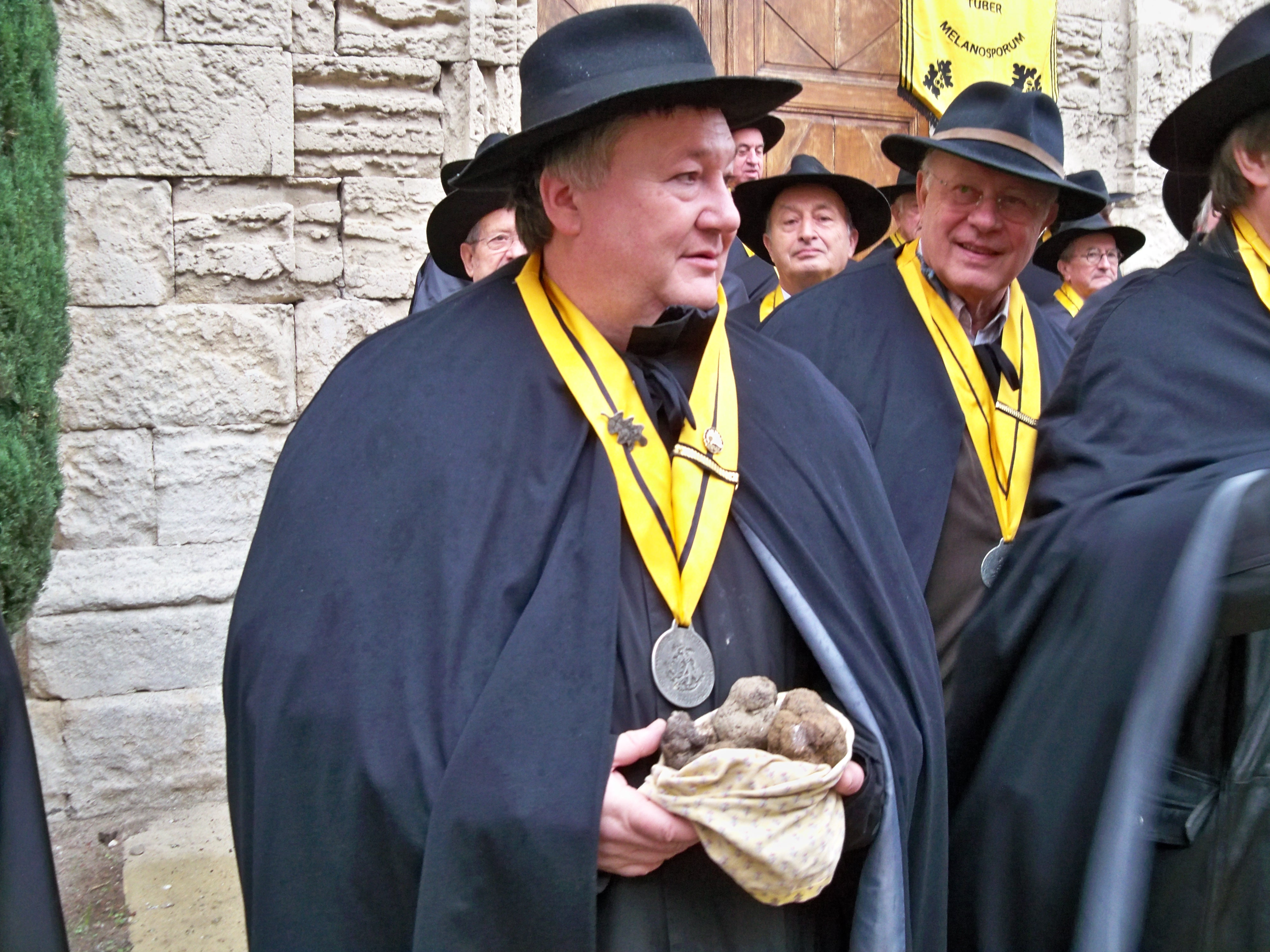 Confrérie du diamant noir de Richerenches (84)